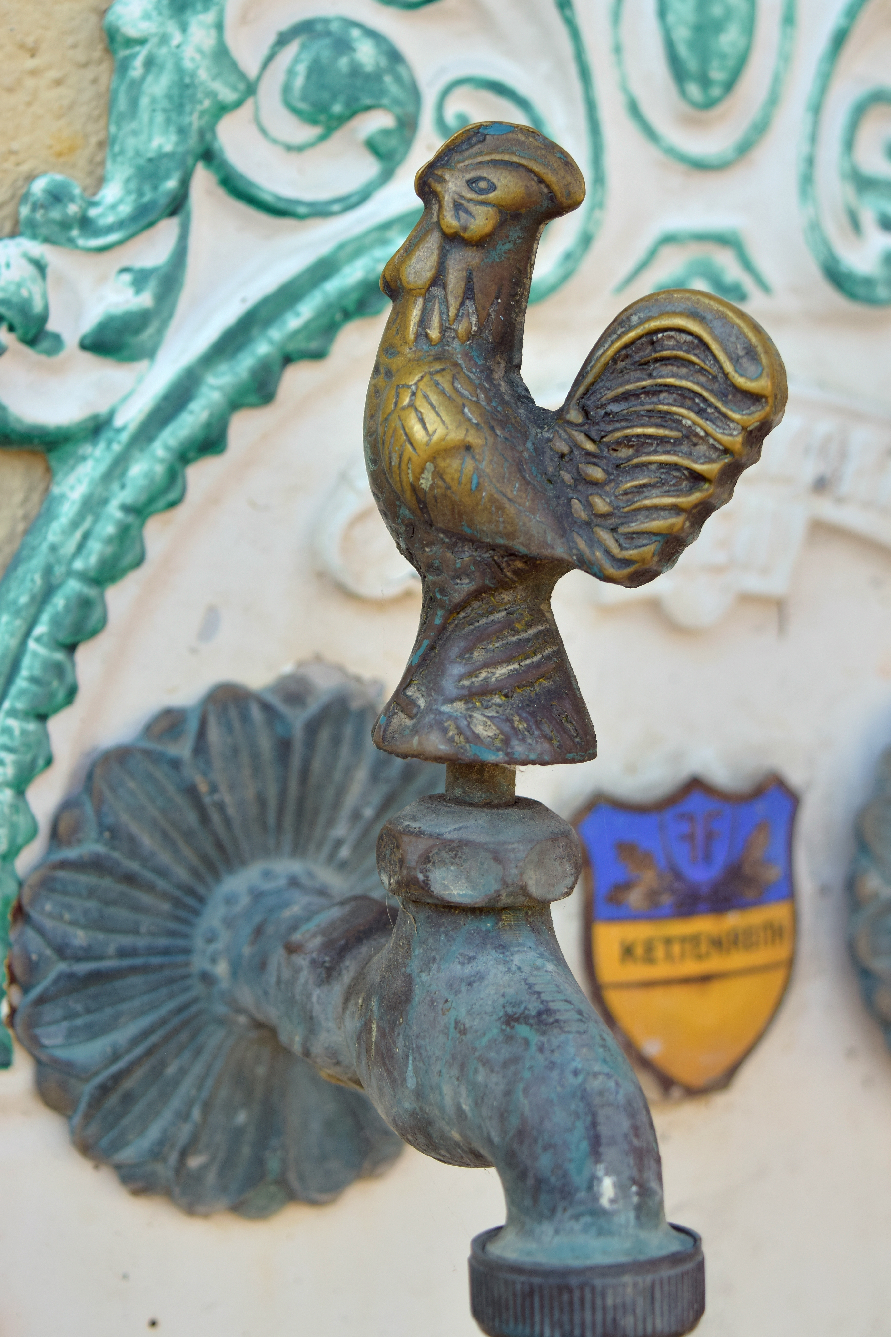 Wasserhahn der Bassena an der Südseite der Freiwilligen Feuerwehr Kettenreith, Gemeinde Kilb